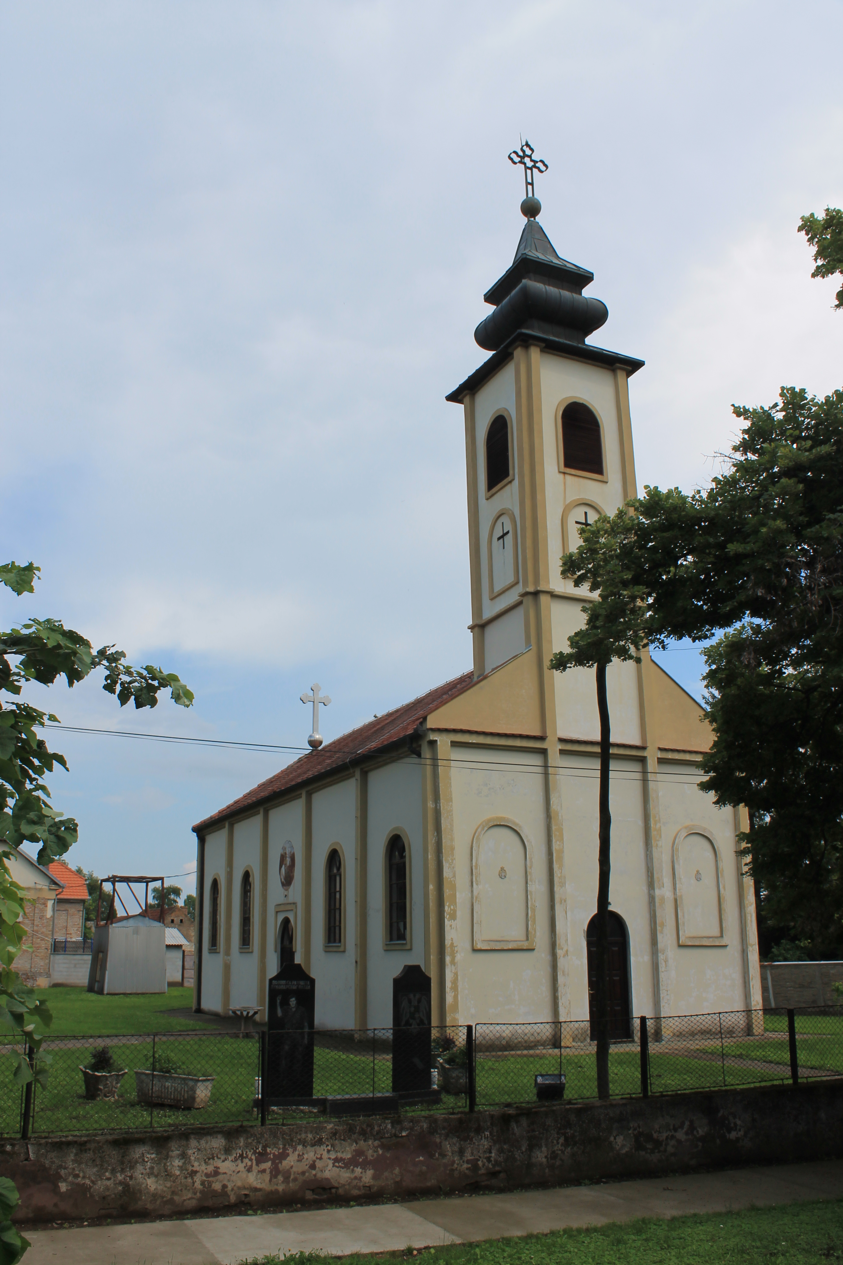 Crkva Sv. Georgija (Bingula)